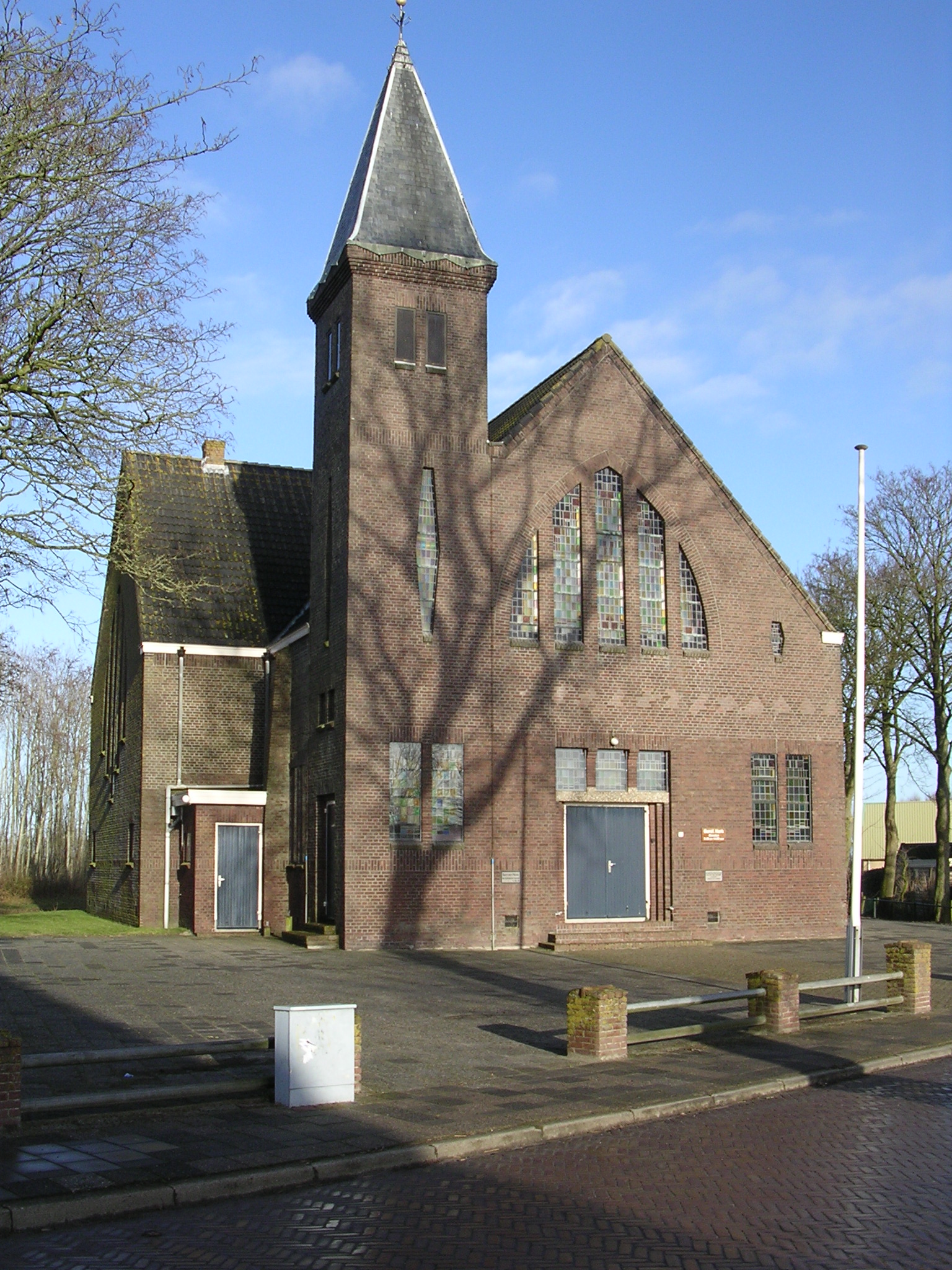 Gerefermearde Tsjerke fan Ljussens (Church in the village Lioessens)